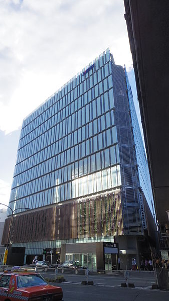 吉祥寺駅南口の駅ビル「キラリナ京王吉祥寺」。2014年4月23日に開業した。写真は2014年10月撮影したもの。